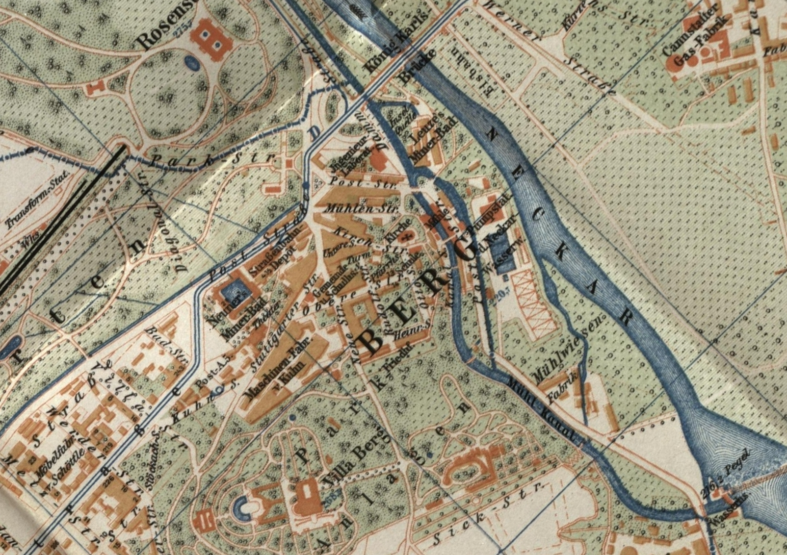 Julius Bazlen, Stuttgart-Berg, Stadtplanausschnitt, 1905. Enthält: „Maschinenfabr. v. Kuhn“, „Kirche“ (Berger Kirche).